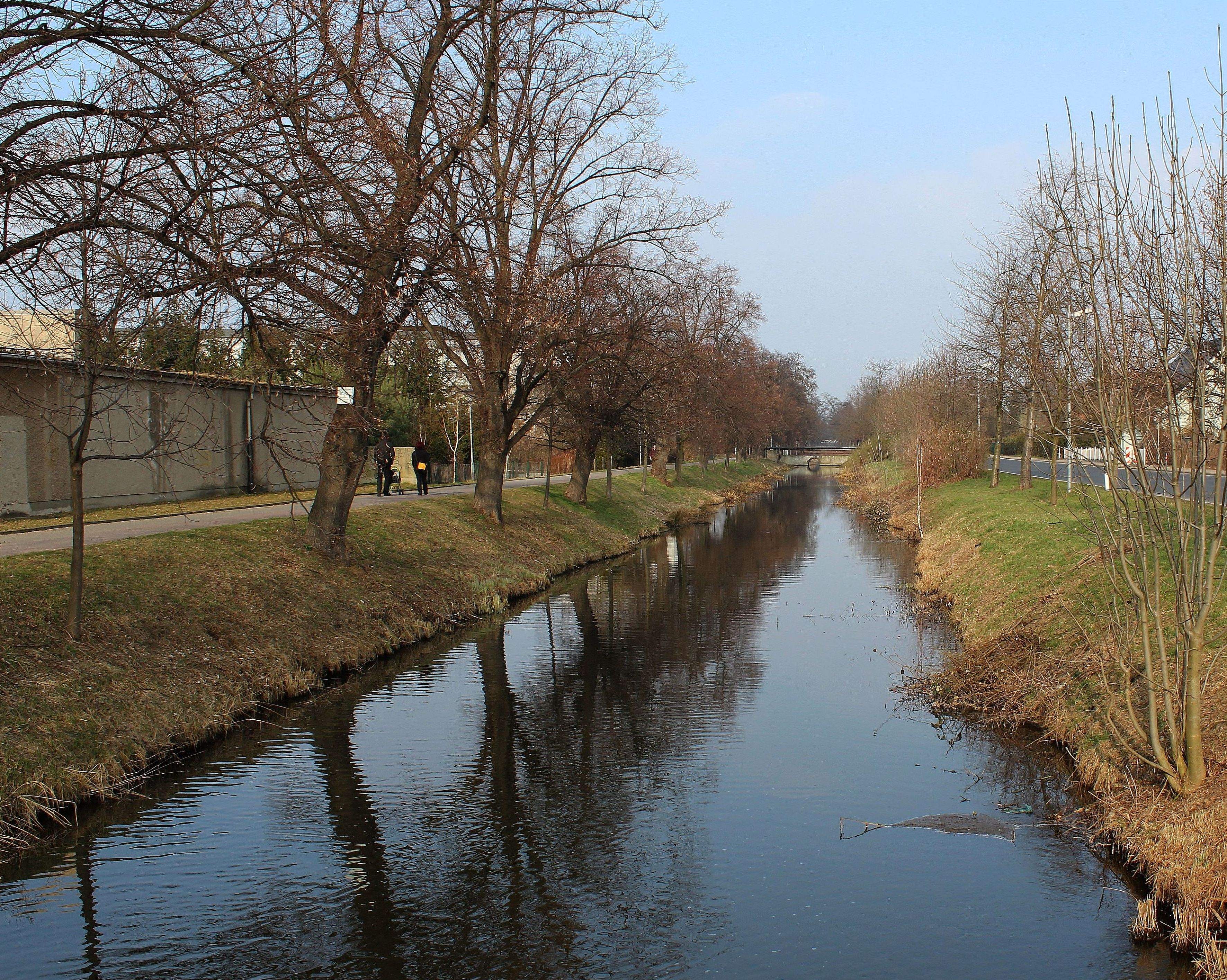 Der Elsterwerda-Grödel-Flosskanal in Gröditz.